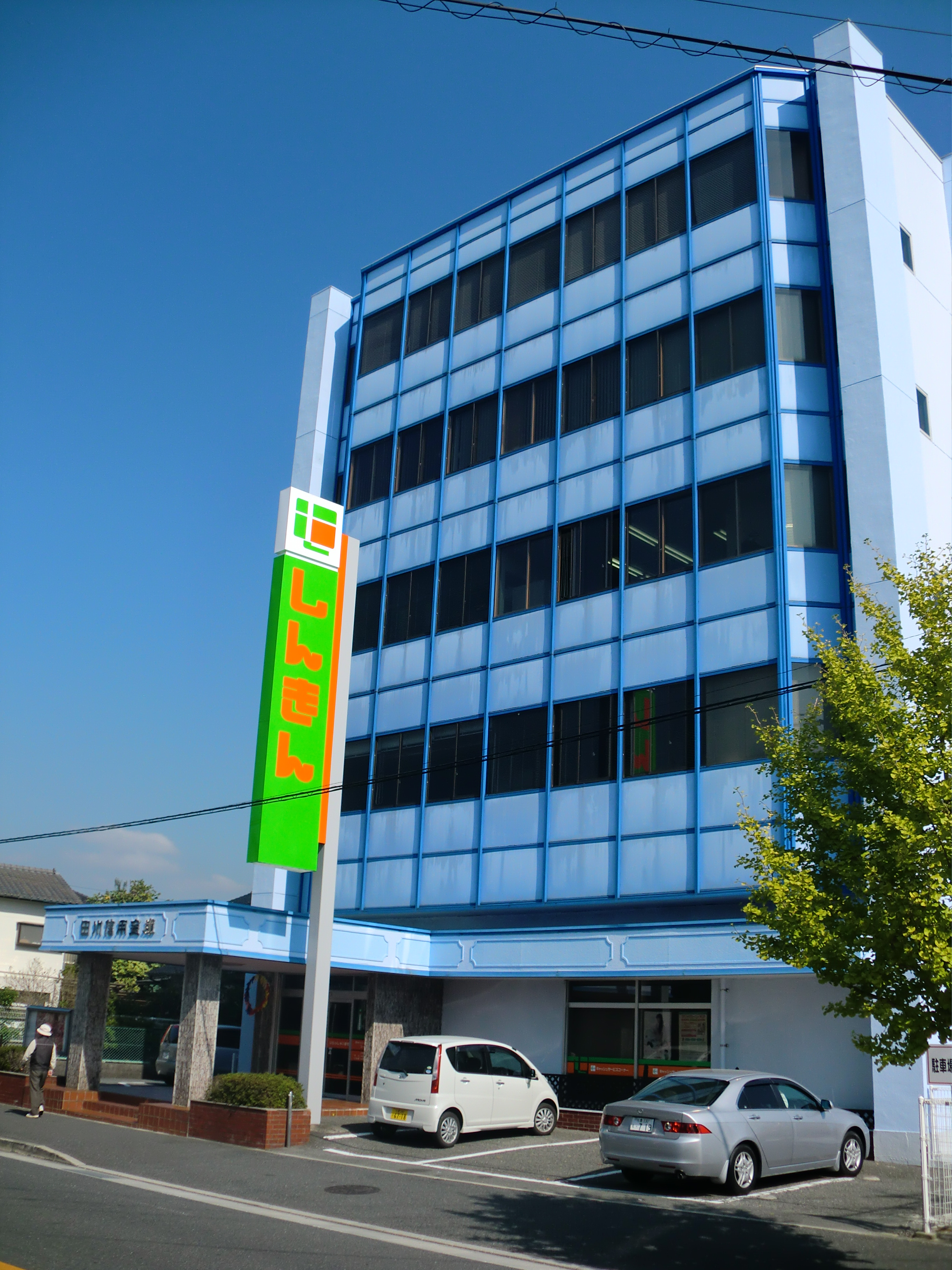 福岡県田川市にある田川信用金庫本店